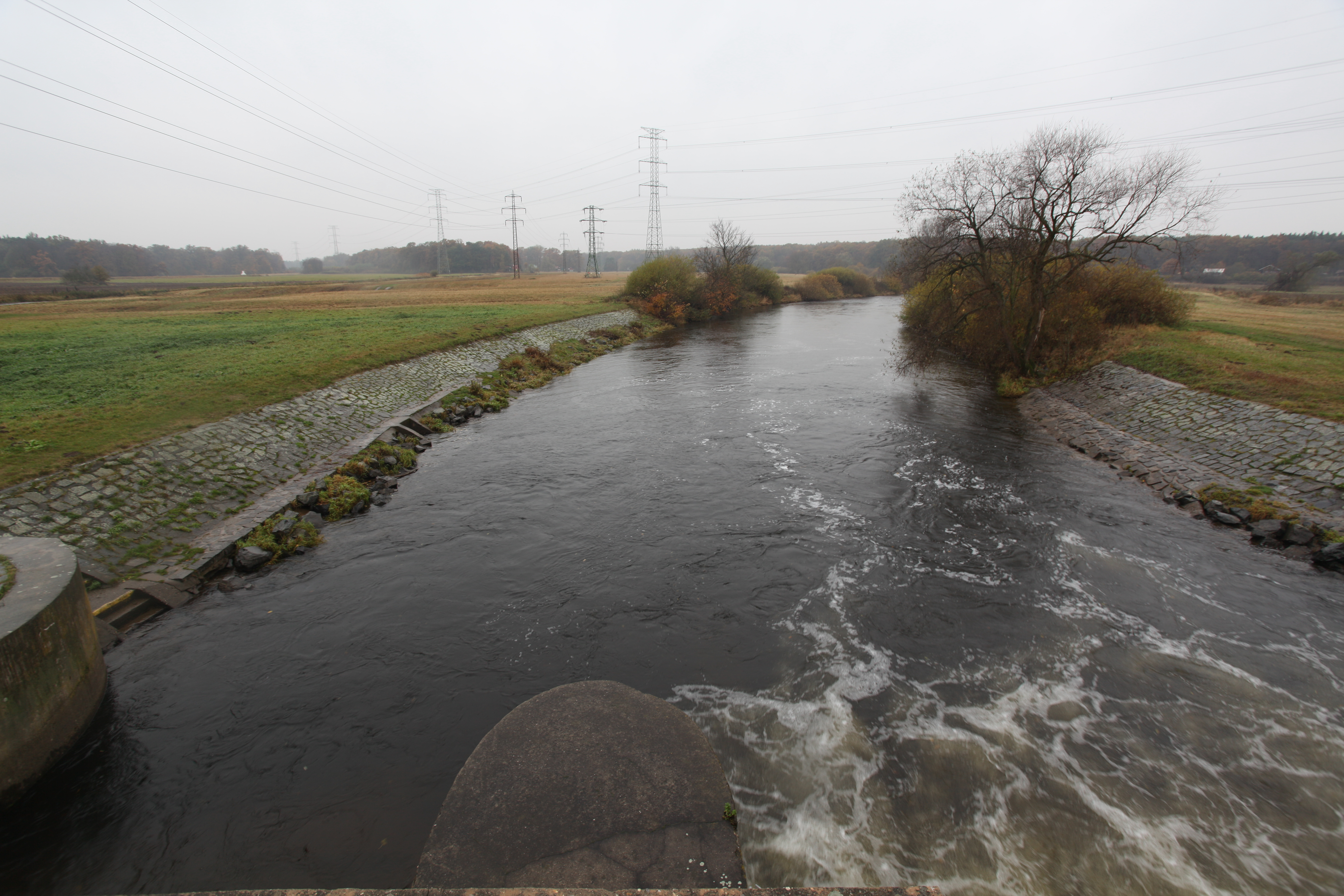 Řeka Jizera na dolním toku, nedaleko Labe. Vlevo uprostřed je vidět malé vyústění z kalové laguny. Voda v kalové laguně je očištěna sedimentací od kalů z prací vody. Jedná se o tzv. propírací vodu, pískových rychlofiltrů z Úpravny vody Sojovice. Označení artéská voda pochází z francouzské provincie Artois, kde byla obdobná voda čerpána mnichy kartuziánského řádu ve 12. století. Voda do Polabí přitéká propustnými pískovci shora od Ještědského hřbetu. Rychlost je však malá, stáří vody bylo odhadnuto na 14 000 let. Tyto propustné pískovce jsou v okolí Káraného o mocnosti 20-30 m a nacházejí se v hloubce 60-80 m. Jsou překryty nepropustnými slínovci. Zdroje: Křivánek, Oldřich a Kněžek, Miroslav. 2001. Zdroje pitné vody v Káraném. Principy získávání vody v oblasti káranské vodárny. Pražské vodovody a kanalizace a.s. Wikipedie Ambrožová, Jana. 2007. Aplikovaná a technická hydrobiologie. VŠCHT